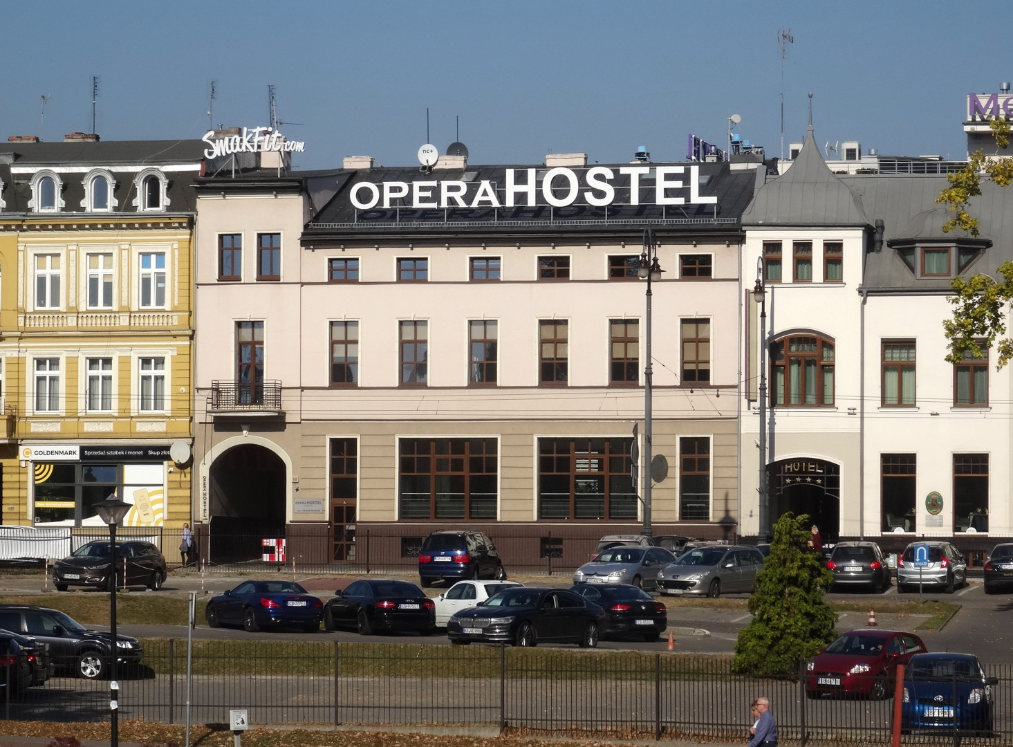 OperaHostel w Bydgoszczy, ul. Marszałka Focha 22